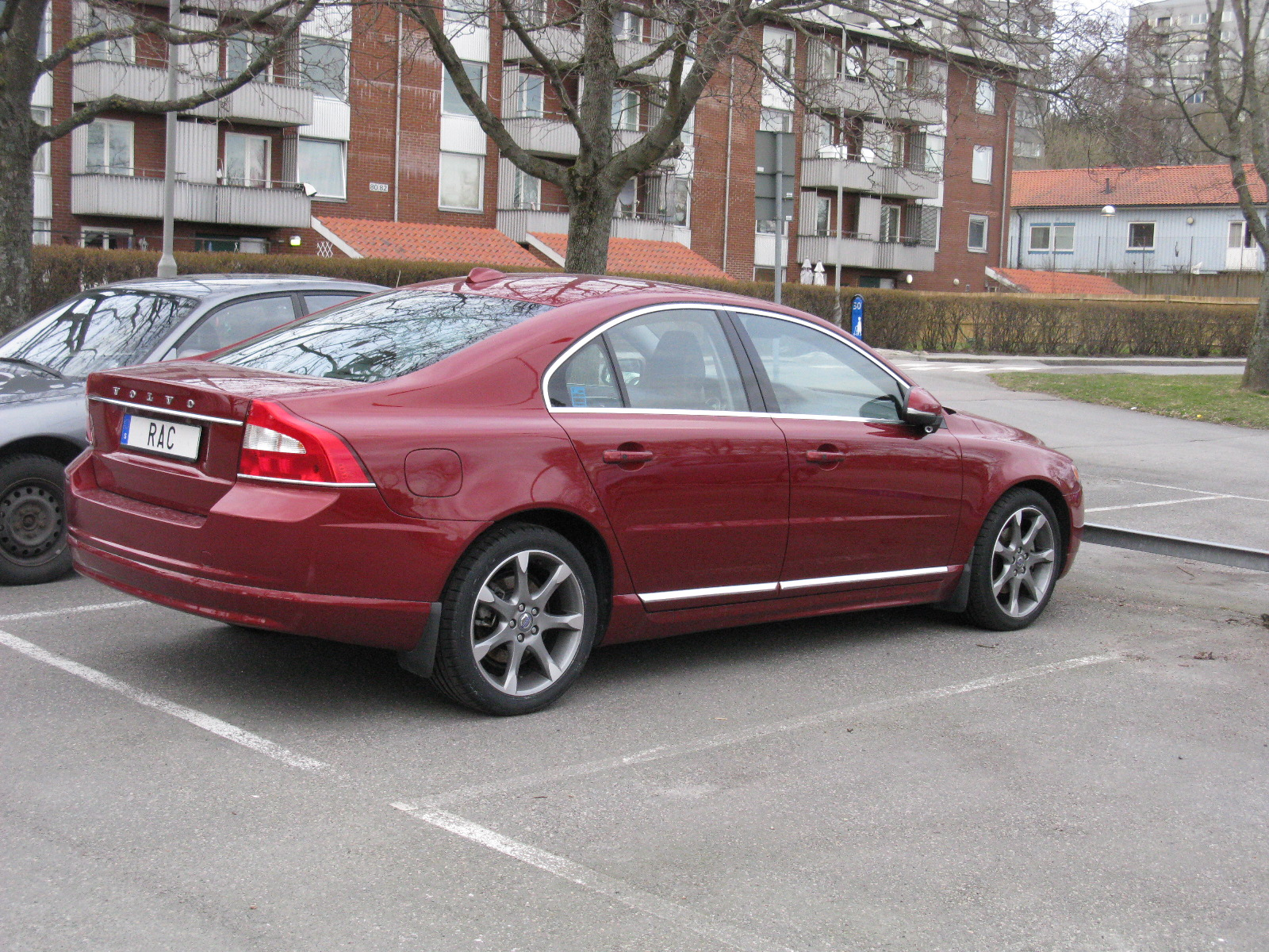 Volvo S80